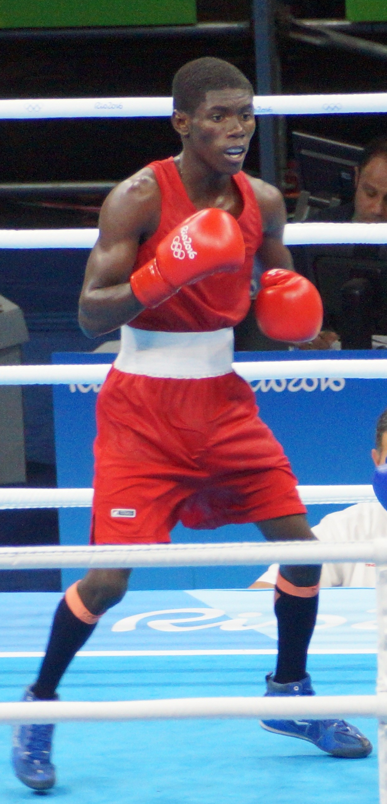 Yuberjen Martínez, Rio Olympics